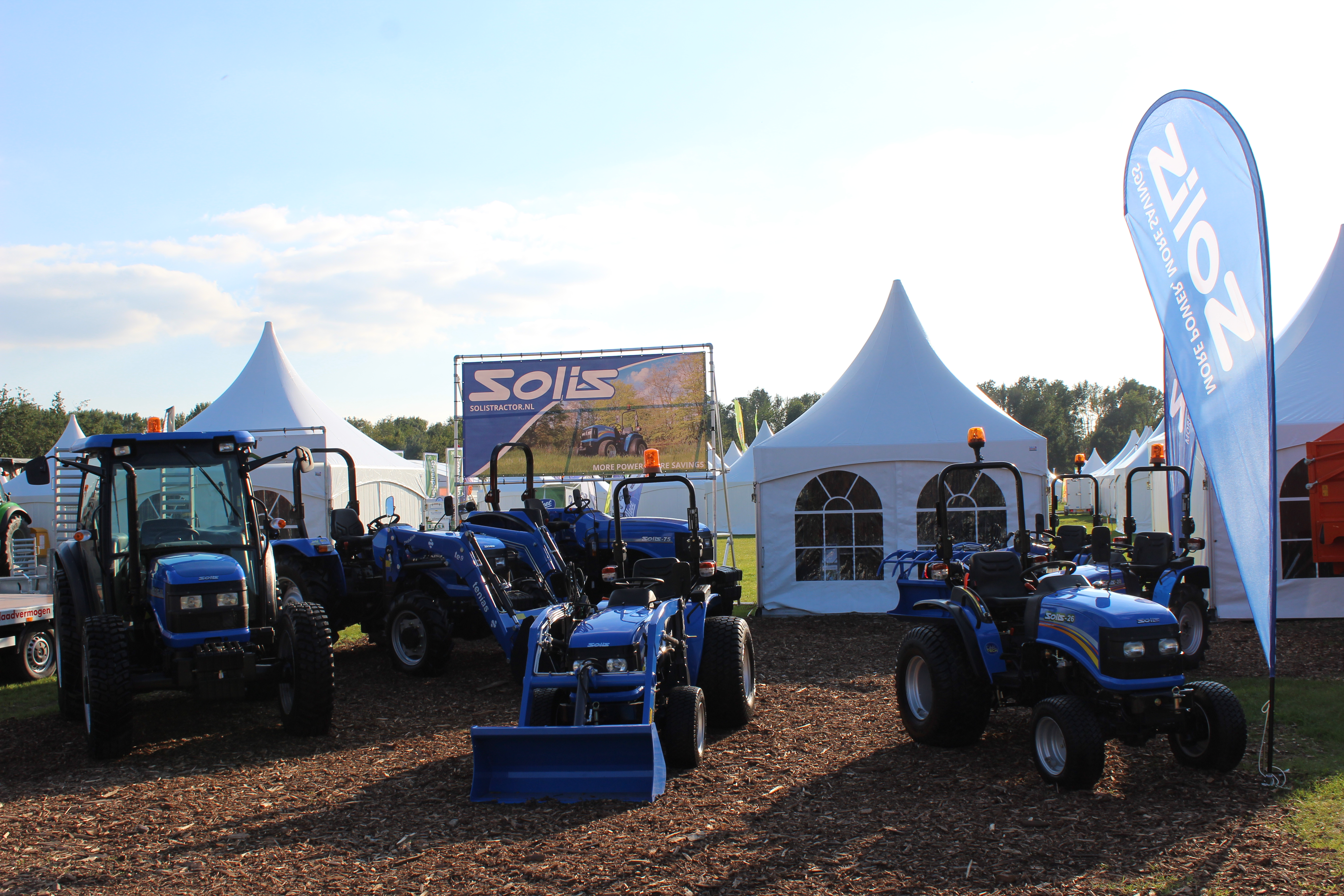 Solis op de beurs Groentechniek Holland in Biddinghuizen op 8,9 & 10 september 2015